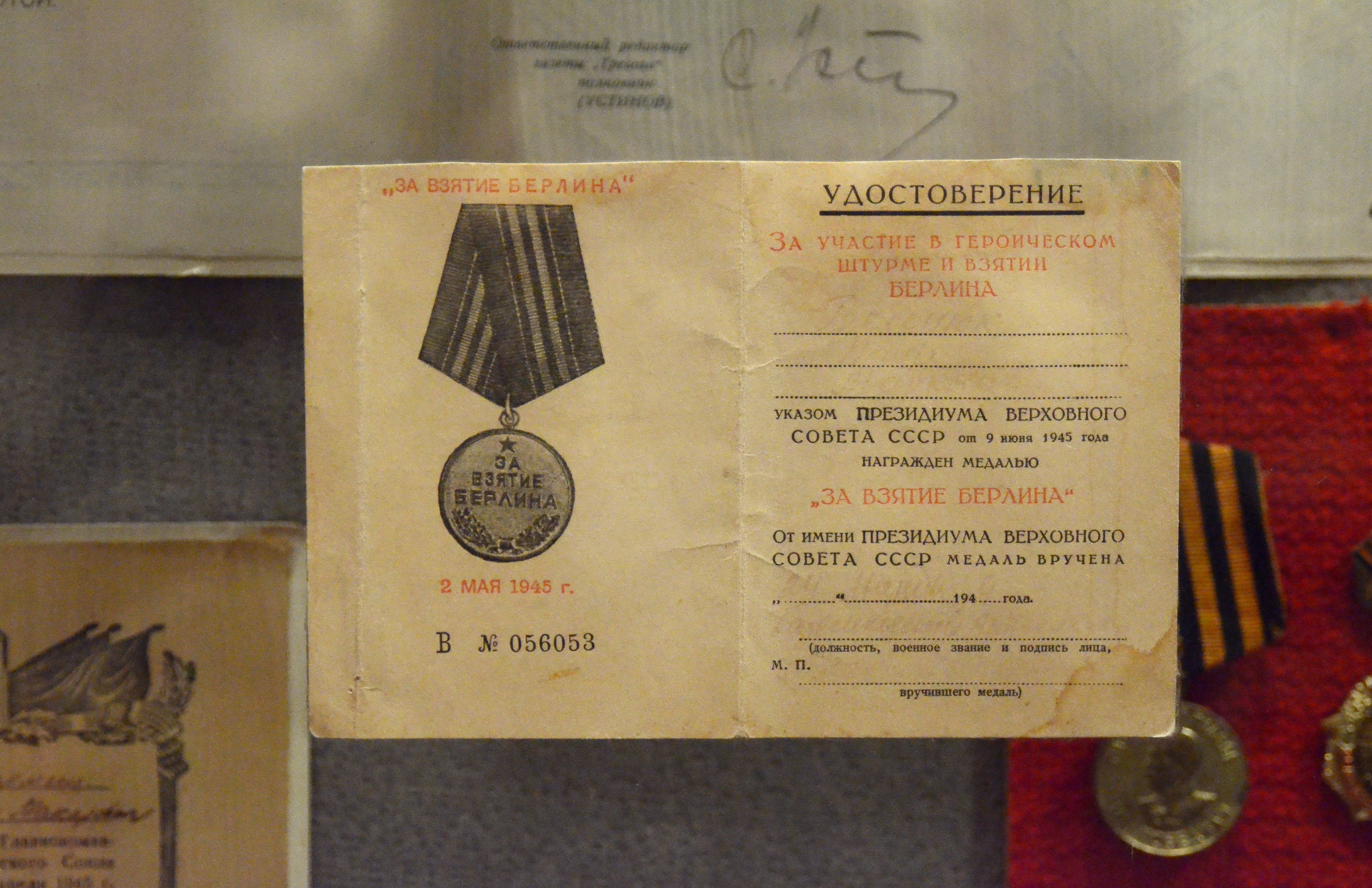 Музей истории города Краматорска